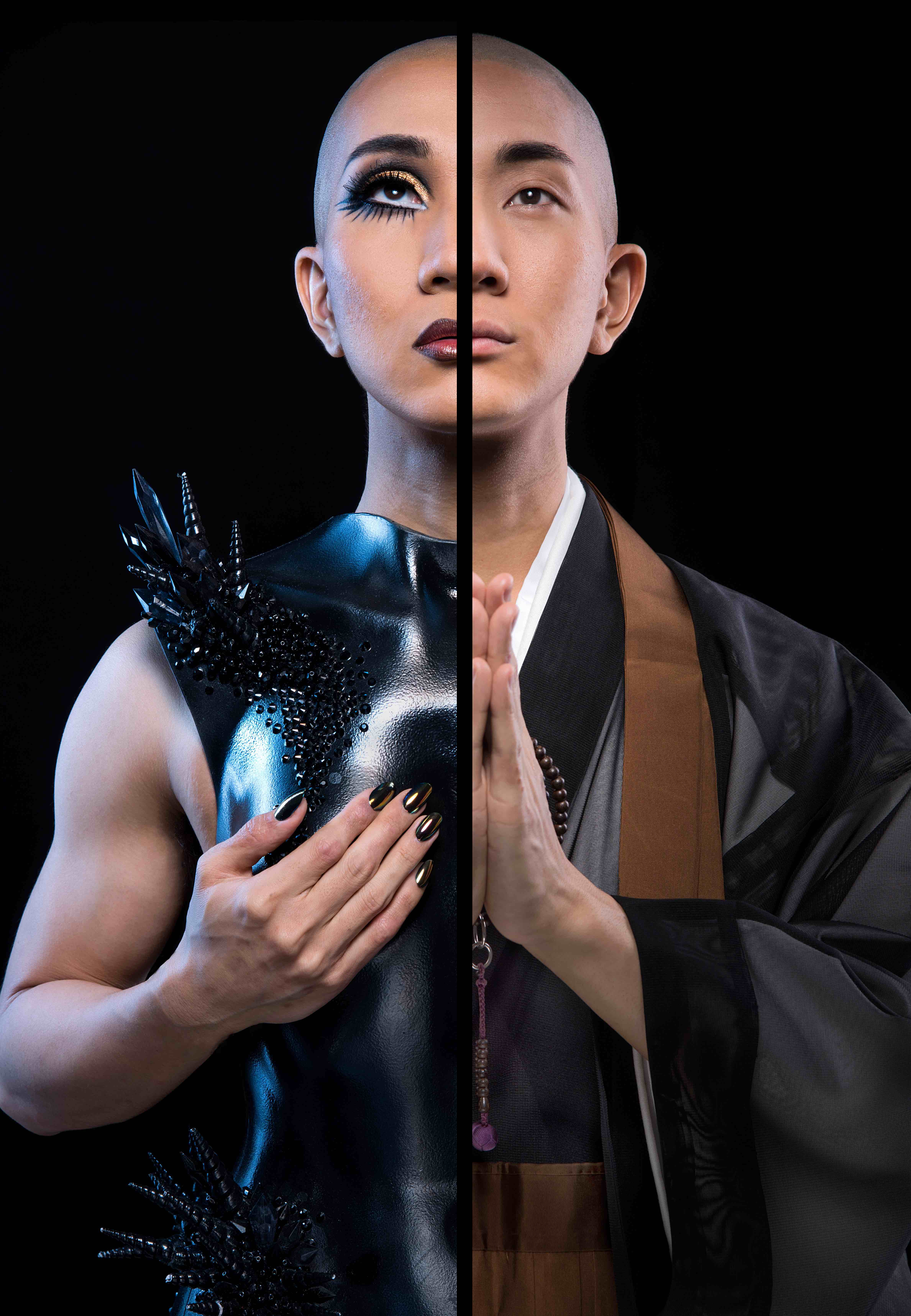 西村宏堂プロフィール